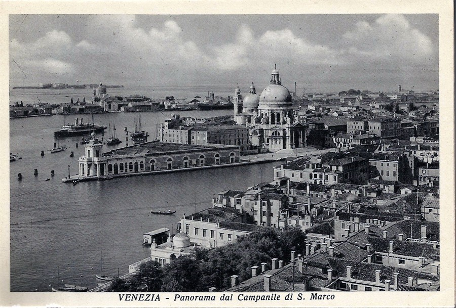 La pointe de la Douane et la Salute à Venise 1930